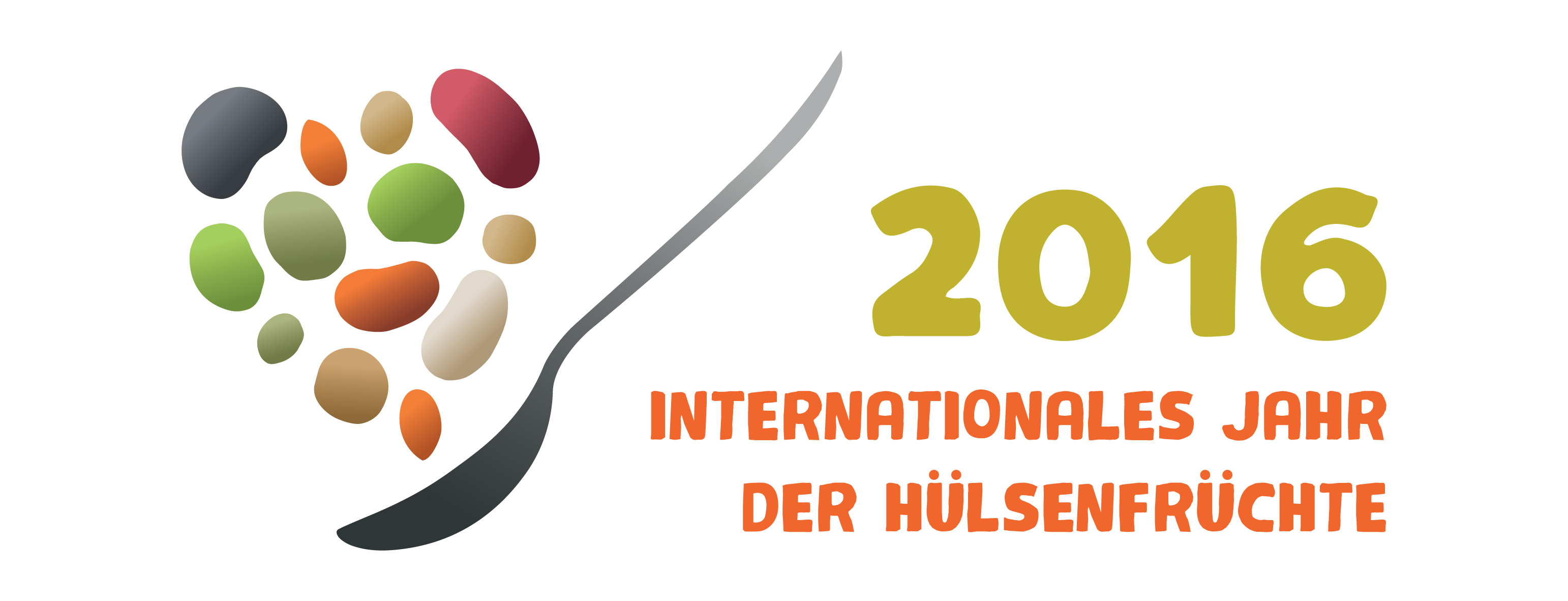 Logo von FAO - International Year of Pulses